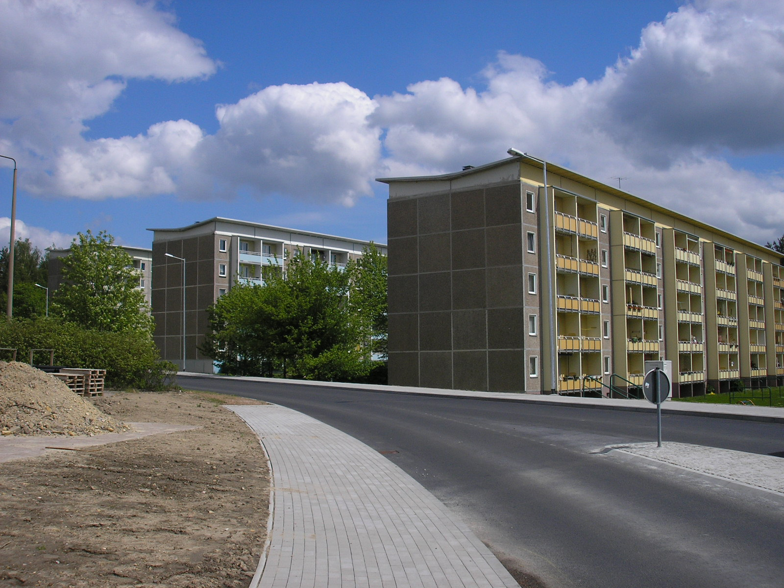 Wohnblocks am Eichicht (Ilmenau, Thüringen).